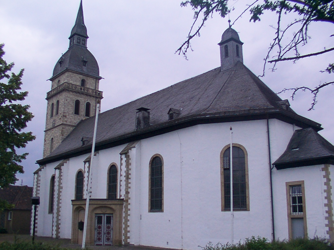 Lichtenau (Westfalen): Katholische Kirche Sankt Achatius in Atteln This is a photograph of an architectural monument.